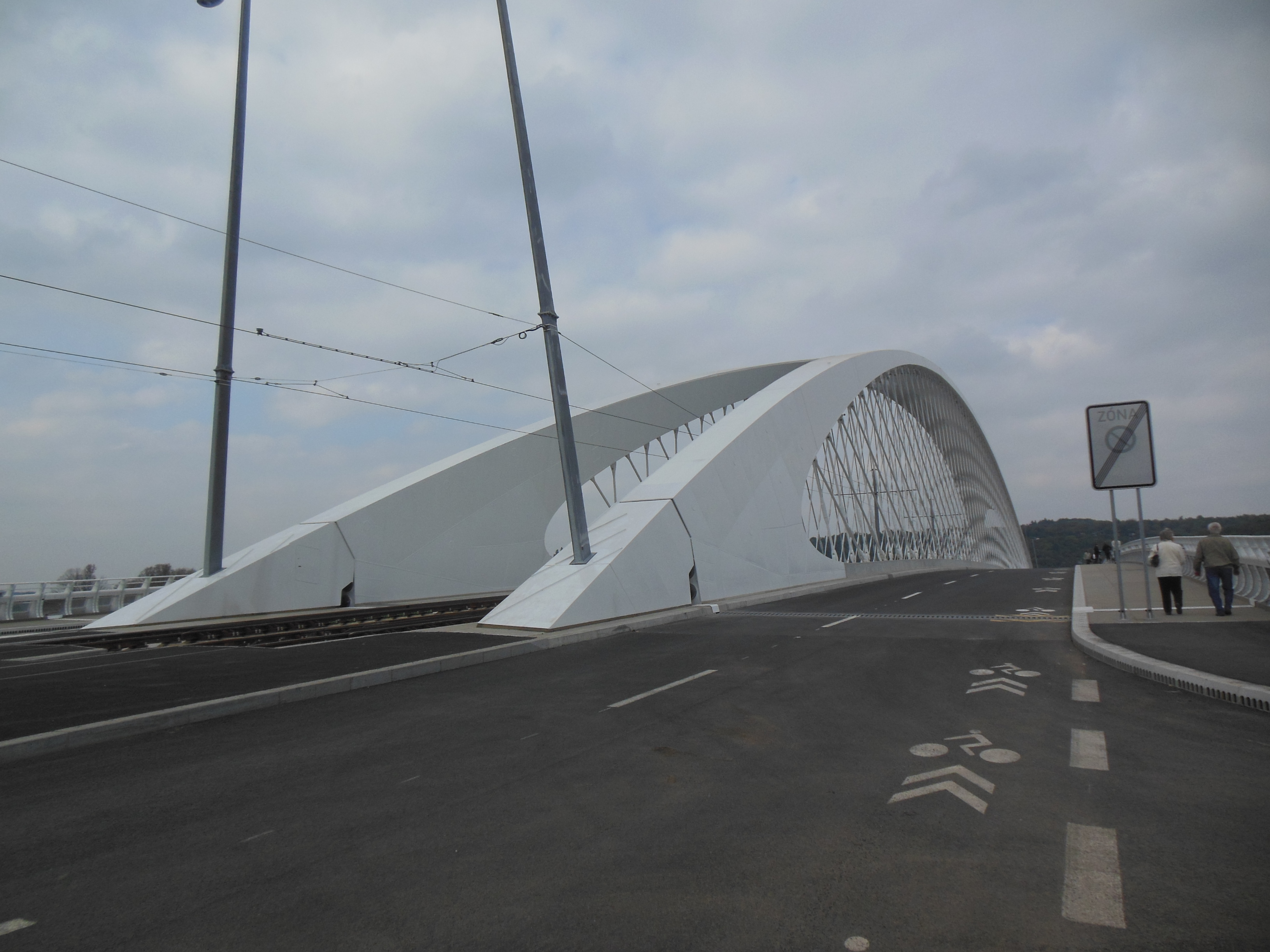 Praha-Holešovice. Trojský most.